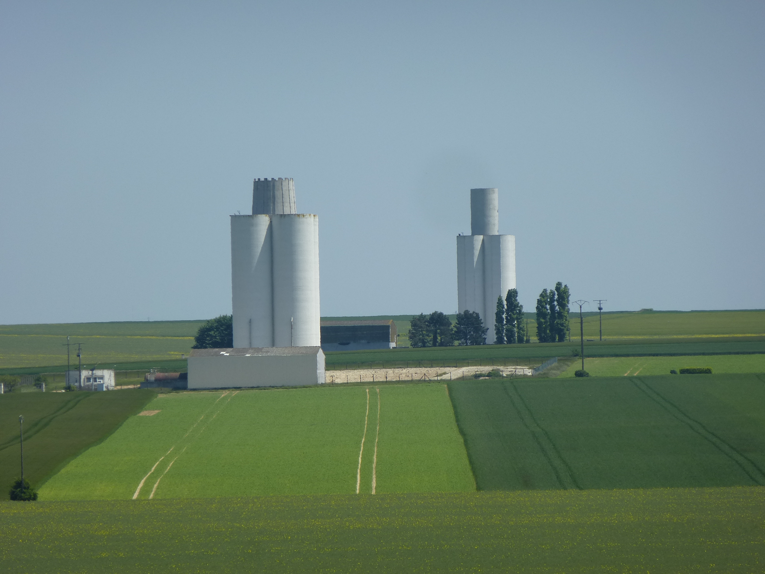 Silos à grains à Villenauxe-la-Petite. (département de la Seine-et-Marne, région Île-de-France).